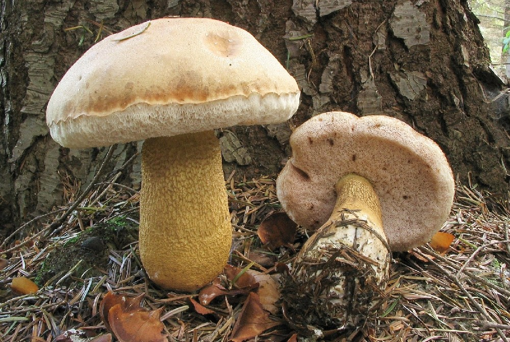 Epeízű tinóru